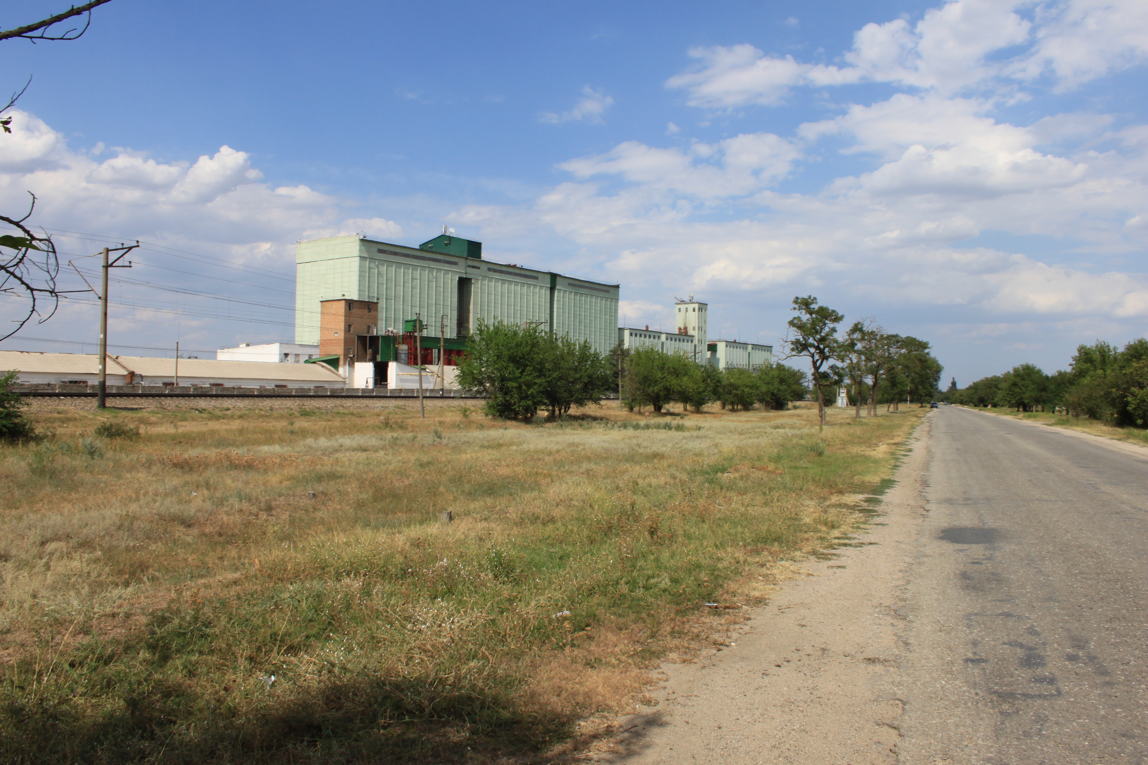 Октябрьское, Элеватор, 23.08.2013